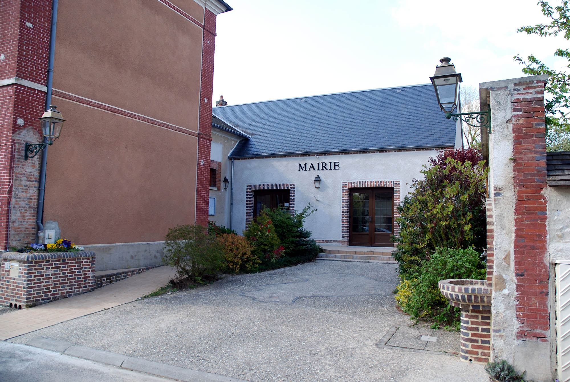 Mairie de Bagneaux (Yonne France)